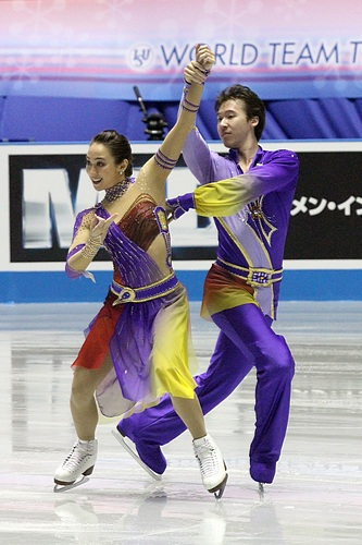 Кэти Рид и Крис Рид (Япония) на командном чемпионате мира по фигурному катанию 2012